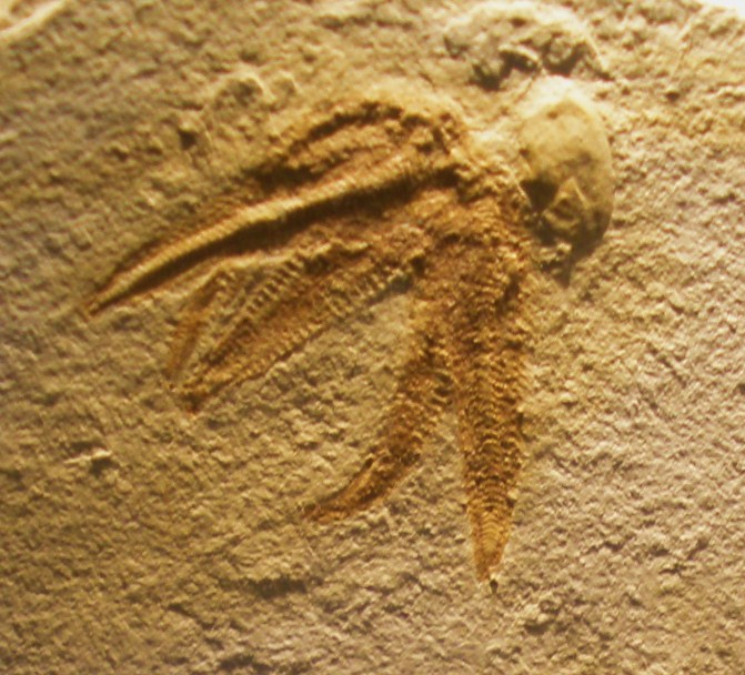 Fossil of Riedaster, an extinct echinoderm - Took the photo at Fossil Show, Munich